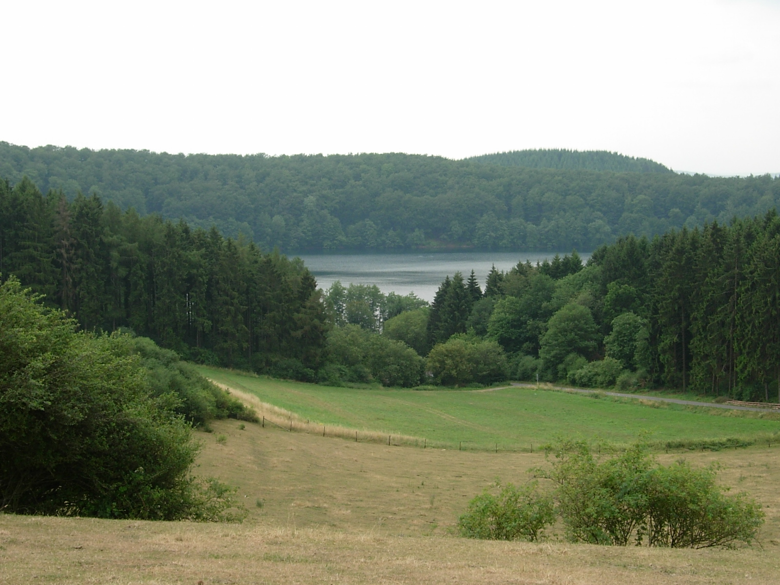 Blick auf das Pulvermaar, einen See vulkanischen Ursprungs in der Vulkaneifel.